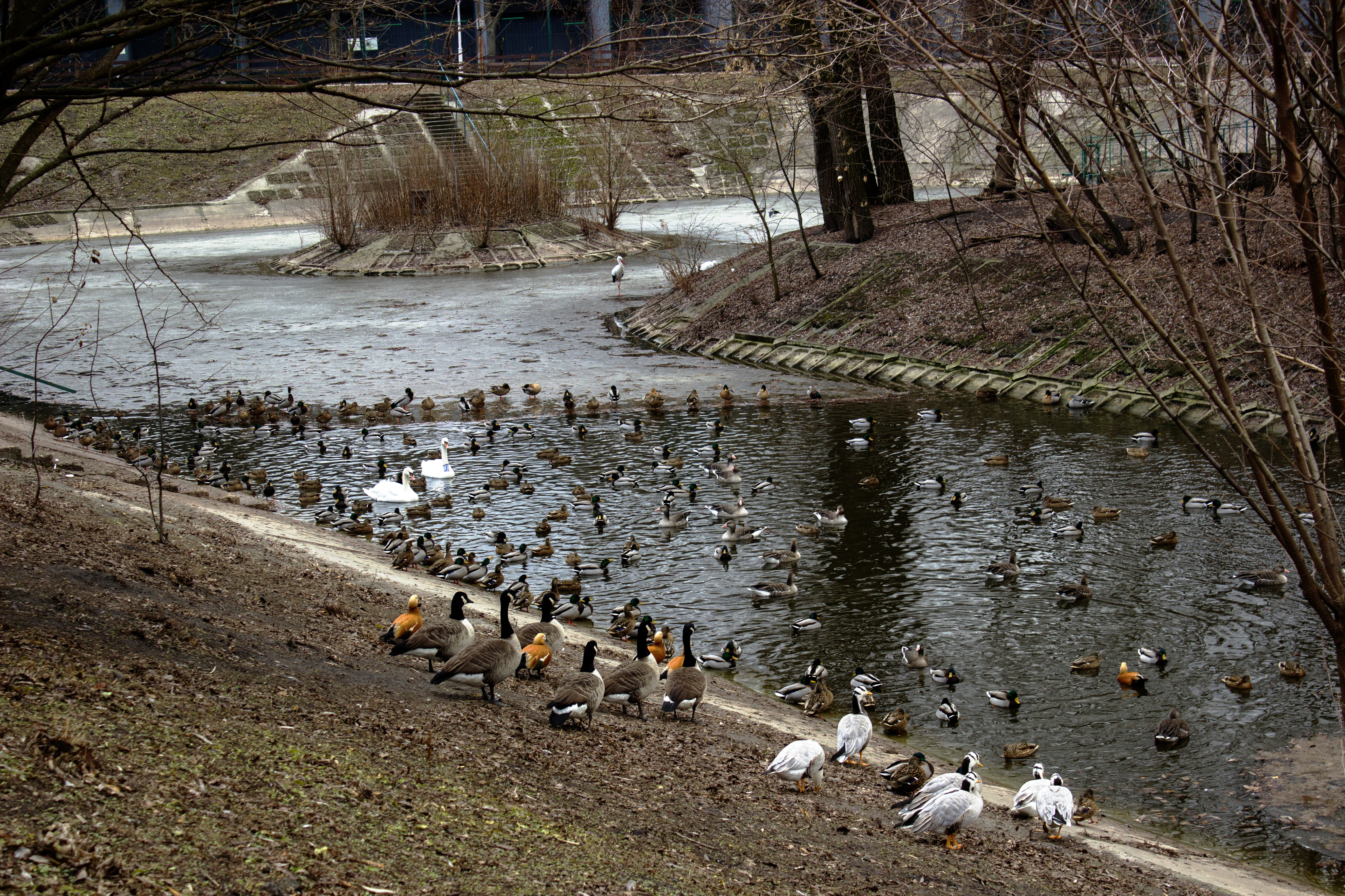 Київський зоопарк, Шевченківський район